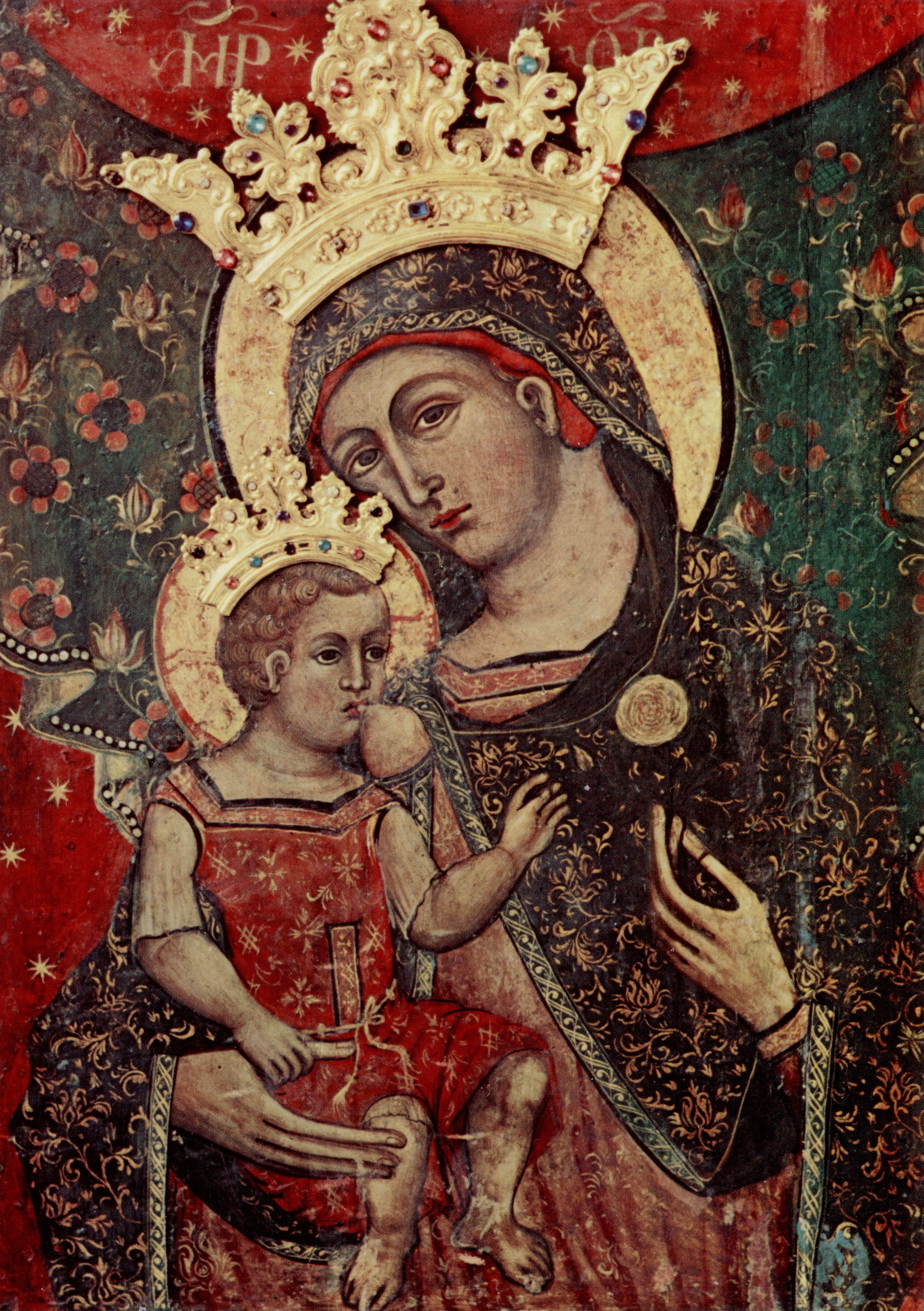 Udine - Chiesa della Beata Vergine delle Grazie